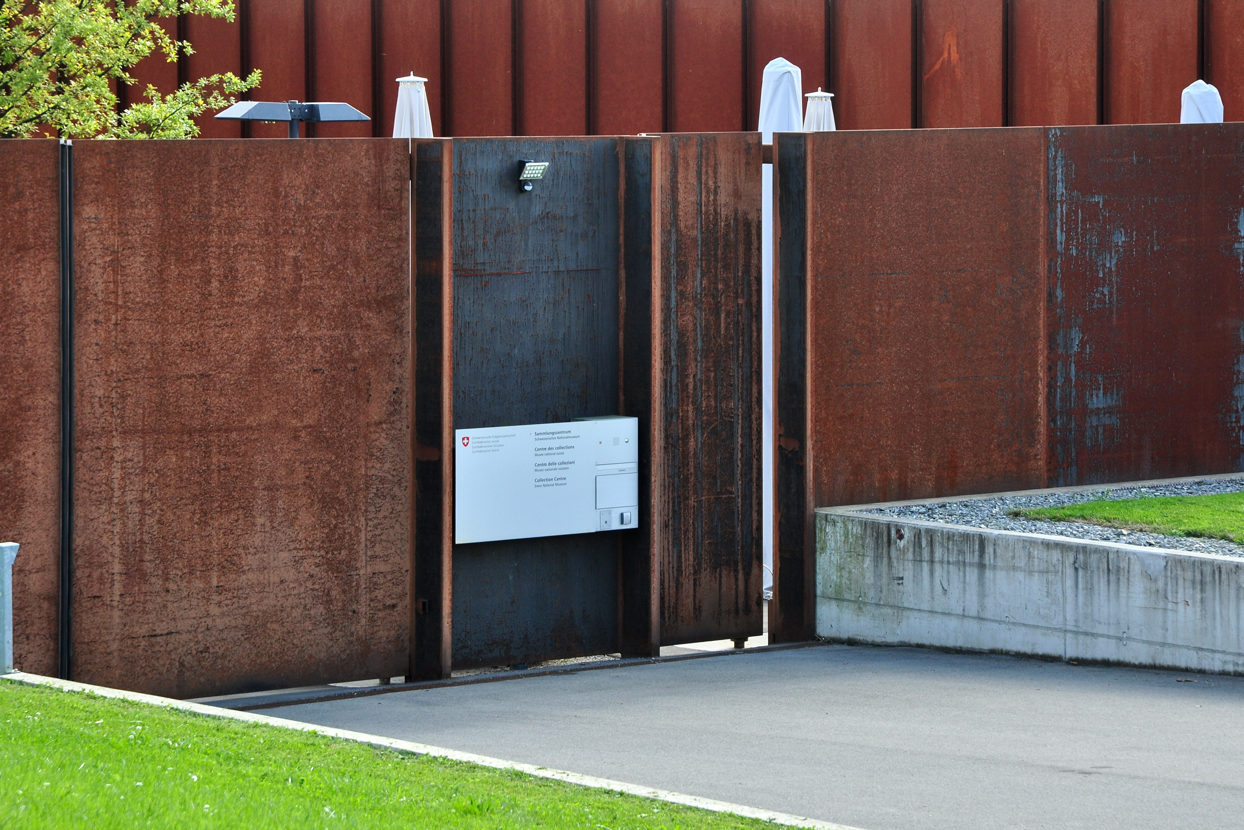 Sammlungszentrum des Schweizerischen Nationalmuseums, Lindenmoosstrasse 3 in Affoltern am Albis (Switzerland)